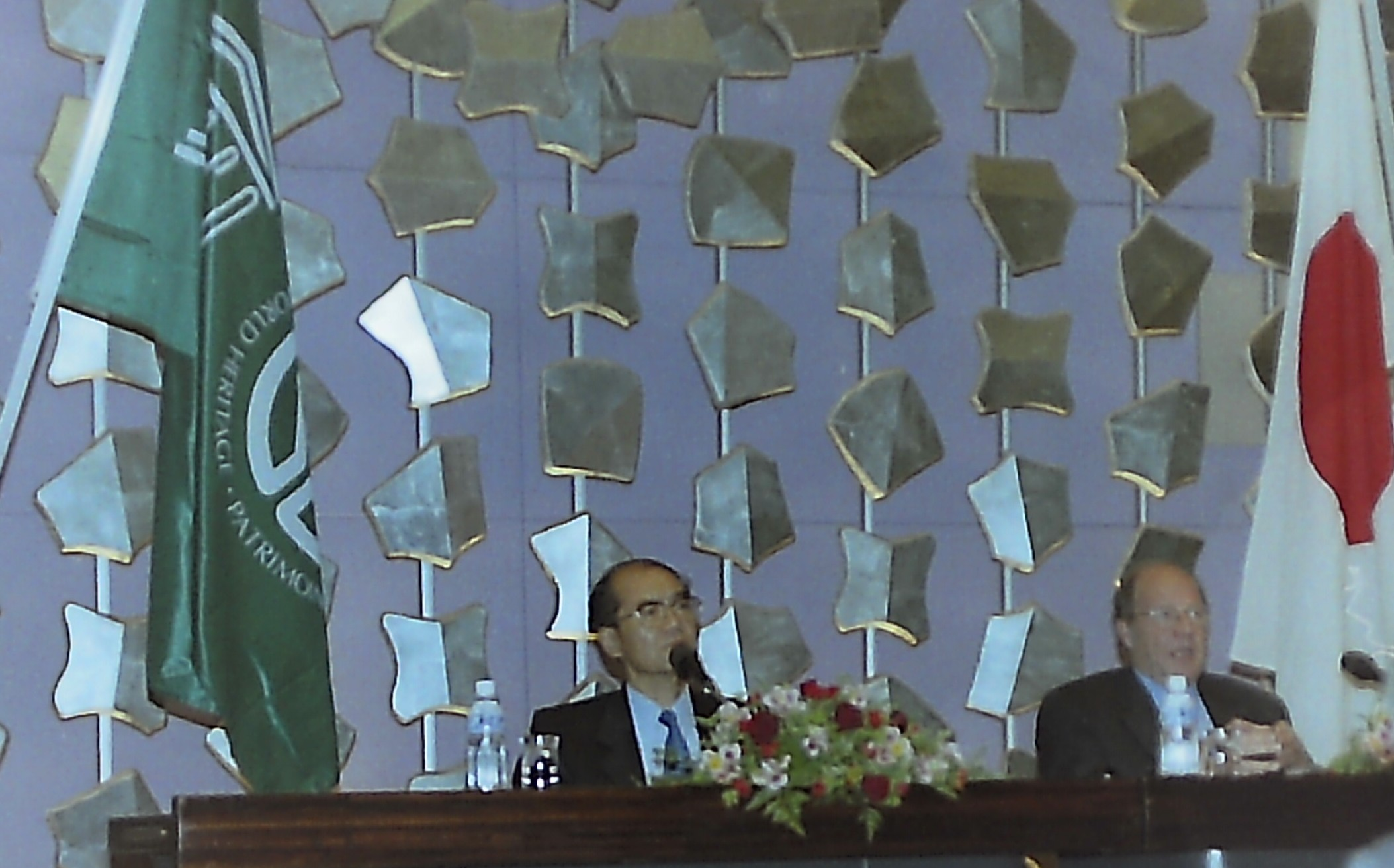 1998年に国立京都国際会館で開催された第22回世界遺産委員会の様子を関係者として出席していた際に撮影。右がドロステ世界遺産センター長、左は後にユネスコ事務局長となる松浦晃一朗駐仏大使・第22回世界遺産委員会議長（いずれも当時の肩書）。フィルムスキャナーでネガをデジタル画像化した。